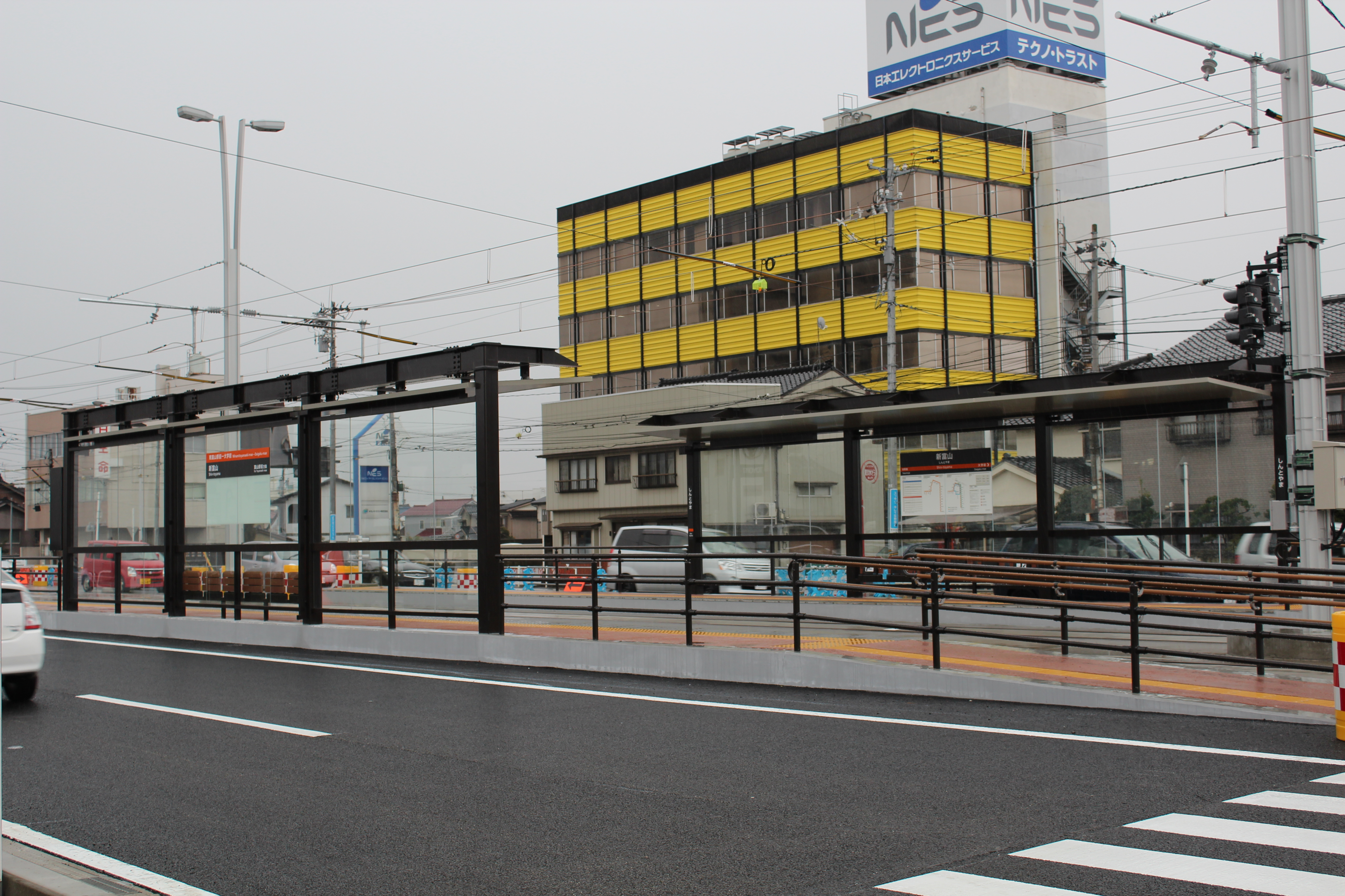 富山市内軌道線_新富山駅